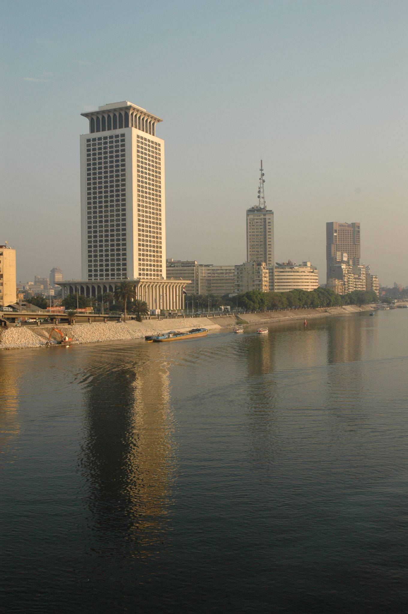 Cairo: edifici riflessi dal Nilo